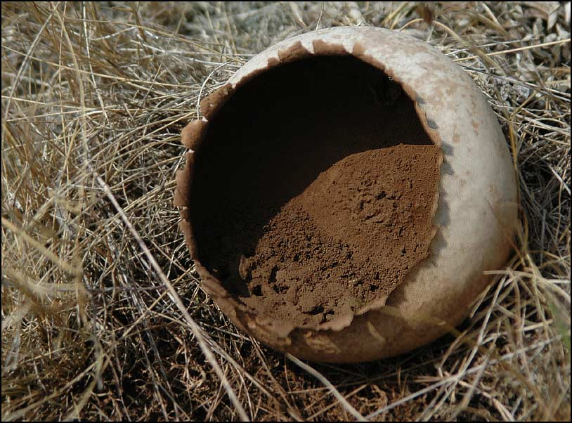 Hasenbovist (Lycoperdon utriforme) auf Trockenrasenstandort, Sporen gut sichbar.